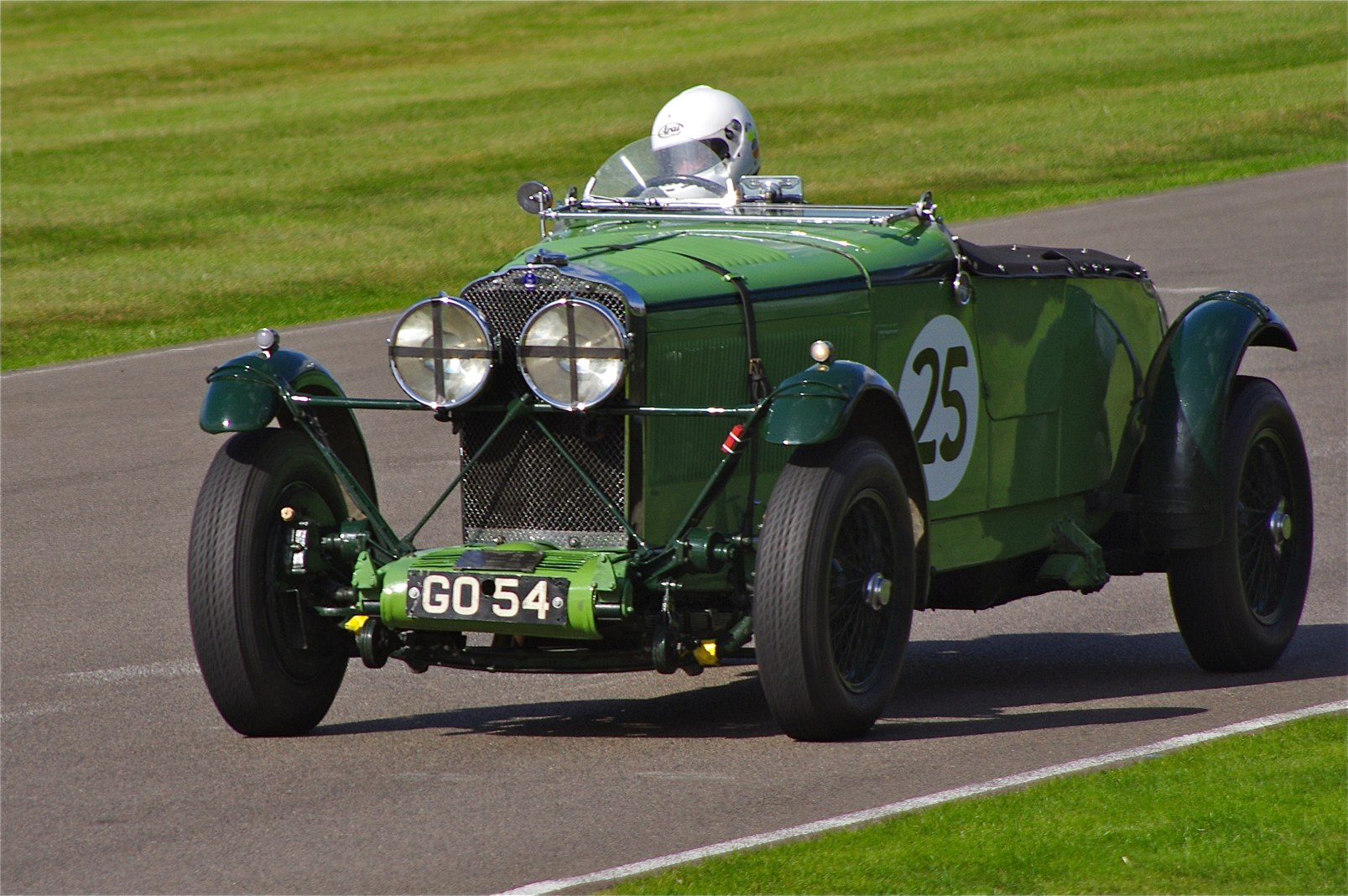 Goodwood Revival 2012